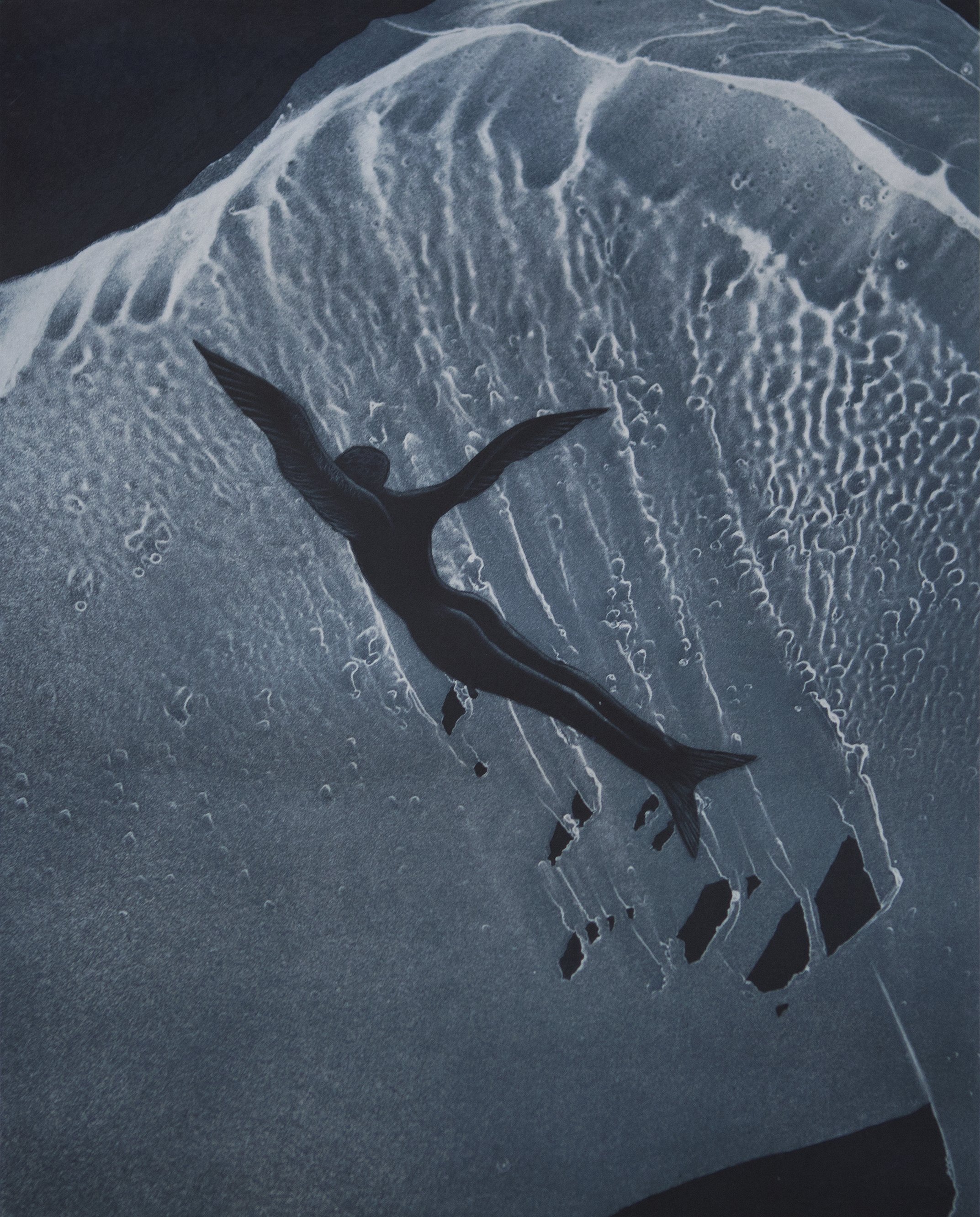 Ebrahim Ehrari, Ikarus, 1999, Aqua Tinta, 70x50cm